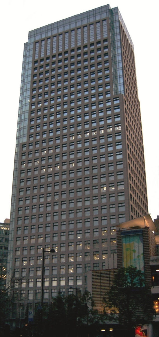 2007年2月18日、東京都千代田区にあるKDDI飯田橋ビルを投稿者本人が撮影。 Category:千代田区の画像 Category:超高層ビルの画像